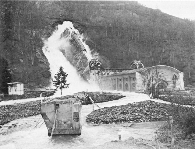 Am 8. Februar 1945 sprengten deutsche Pioniere die Druckleitungen des Kermeterstollens oberhalb des Kraftwerkes Heimbach, um mit diesem Wasser ein Hochwasser im Fluss Rur zu erzeugen und den Vormarsch der Alliierten durch das Rurtal zu behindern.